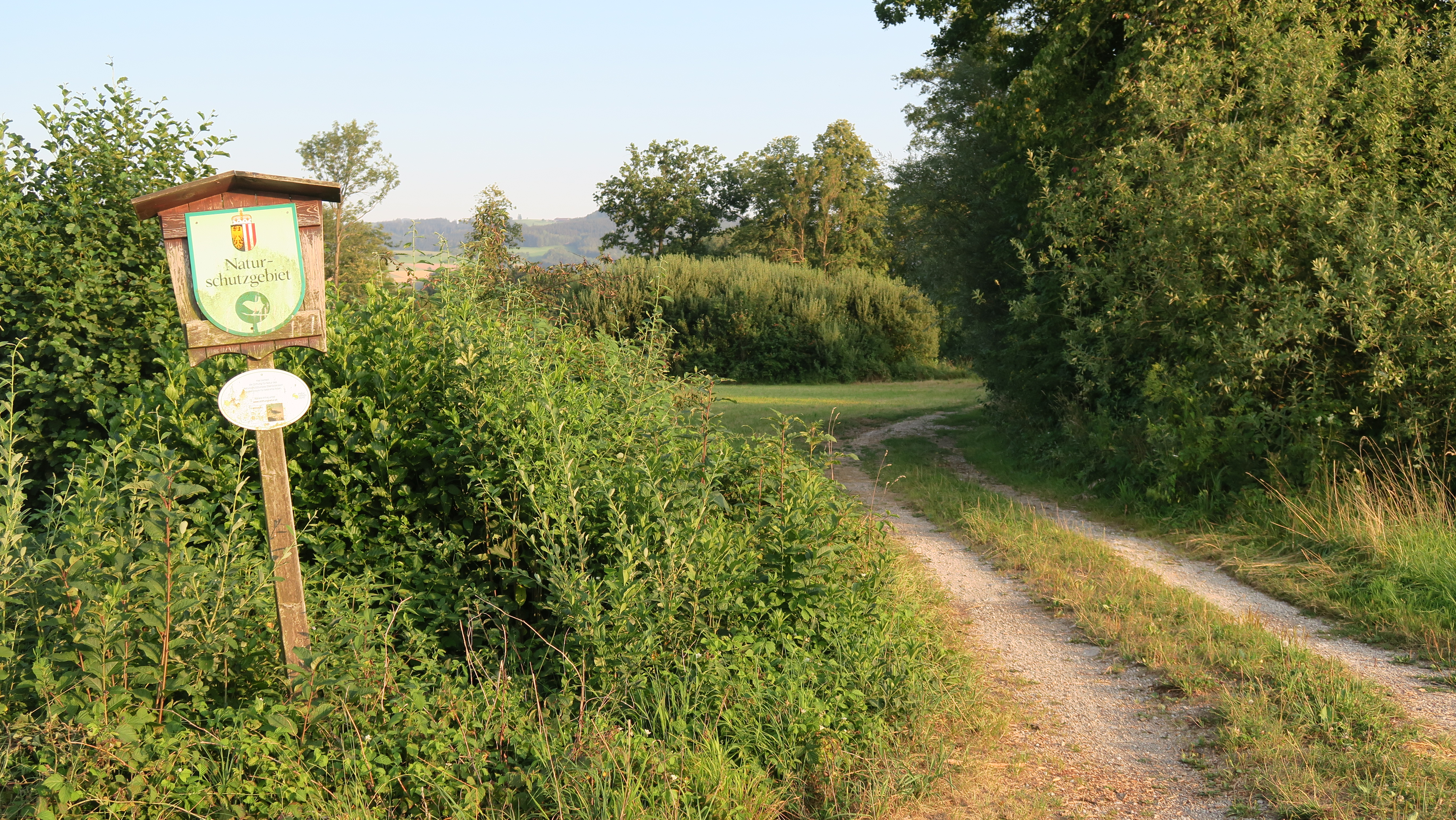 Die 24 Hektar großen Kremsauen sind ein Naturschutzgebiet. Feuchtwiesen, Kleingewässer bieten Vöglen, Amphibien und Insekten Lebensräume. Vor allem der Eisvogel und der Rohrammer sind hier heimisch. Bis Ende der neunziger Jahre war auch der Große Brachvogel, mit seinem symbolisch langen Schnabel, heimisch, jedoch wurde er seitdem nicht mehr gesehen. This media shows the nature reserve in Upper Austria with the ID n111.